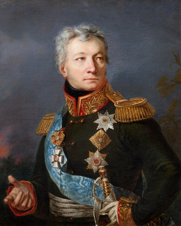 Александр Петрович Тормасов